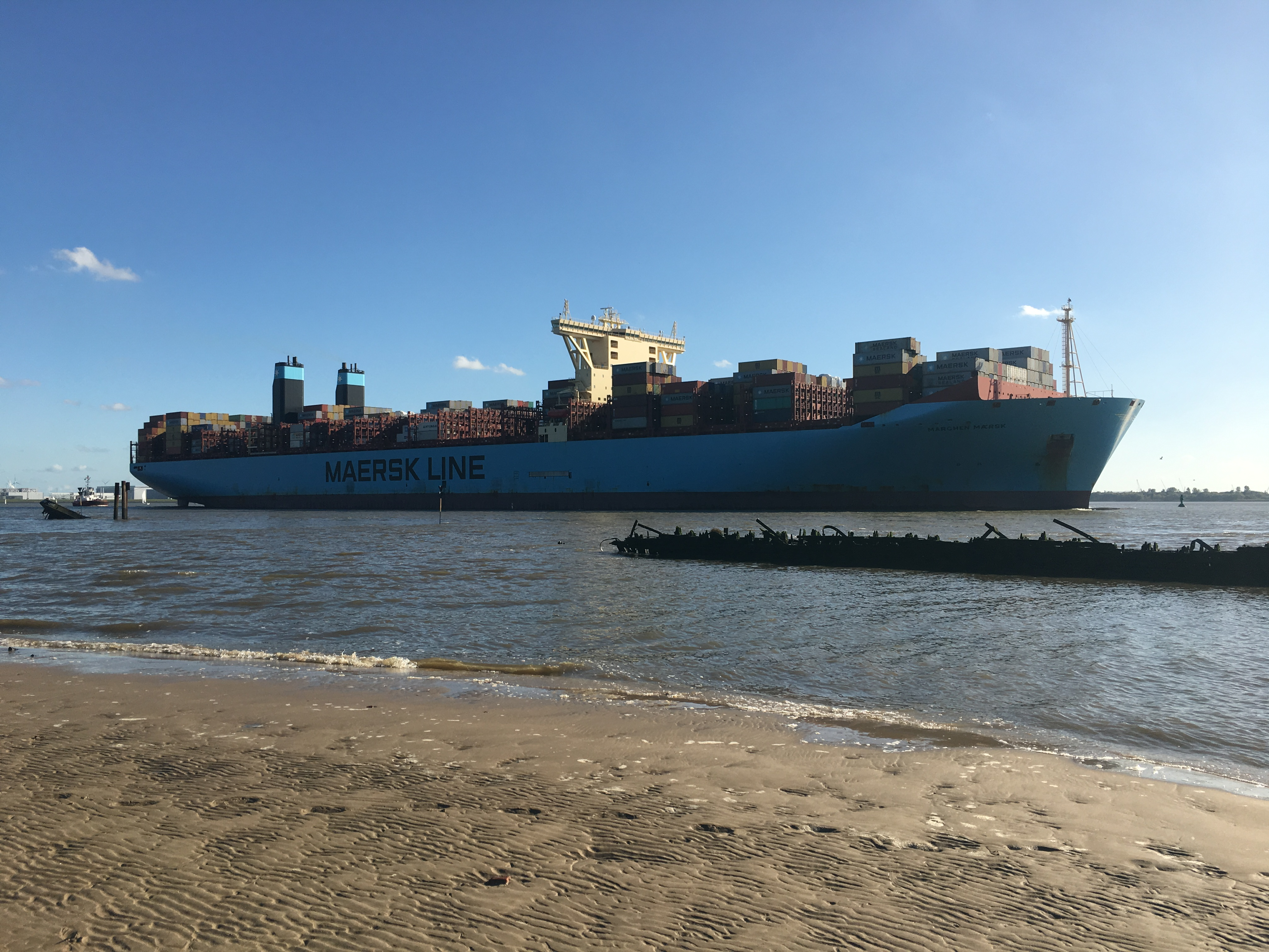 Das Containerschiff Marchen Maersk auf der Elbe bei Hamburg. Im Vordergrund sind die Schiffswracks Uwe (links) und Polstjernan (rechts) zu sehen.